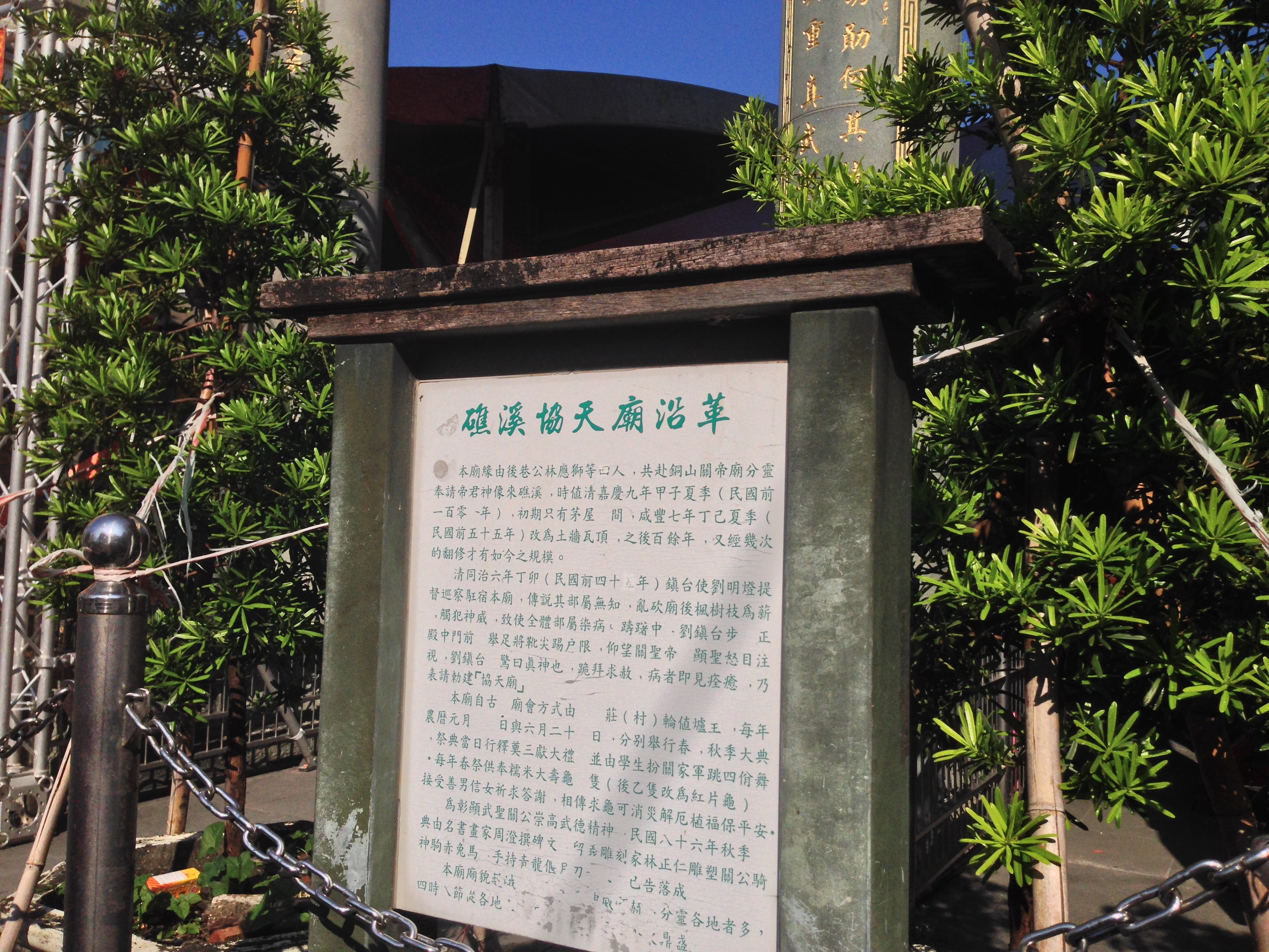 中文（台灣）: 礁溪協天廟說明